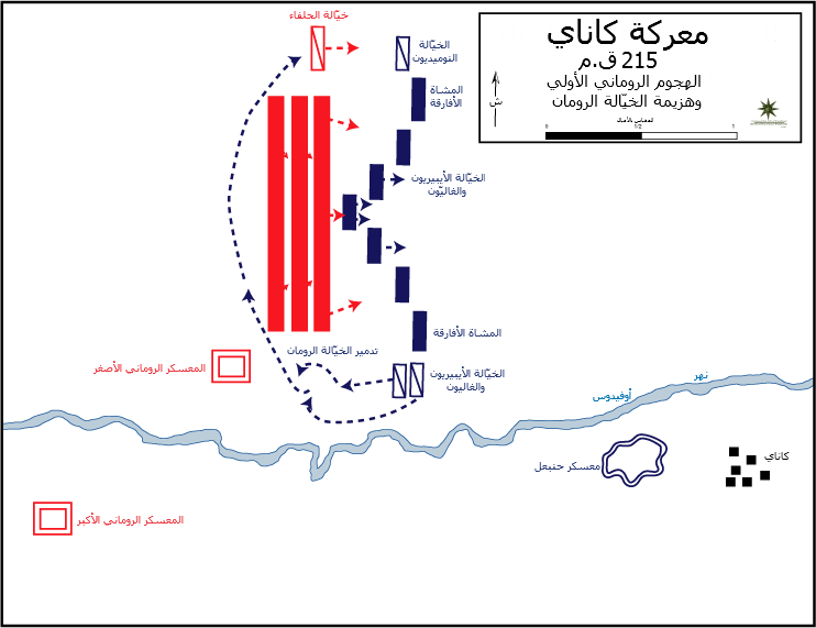 مُخطط معركة كاناي، الهجوم الروماني الأولي، وهزيمة الخيّالة الرومان.